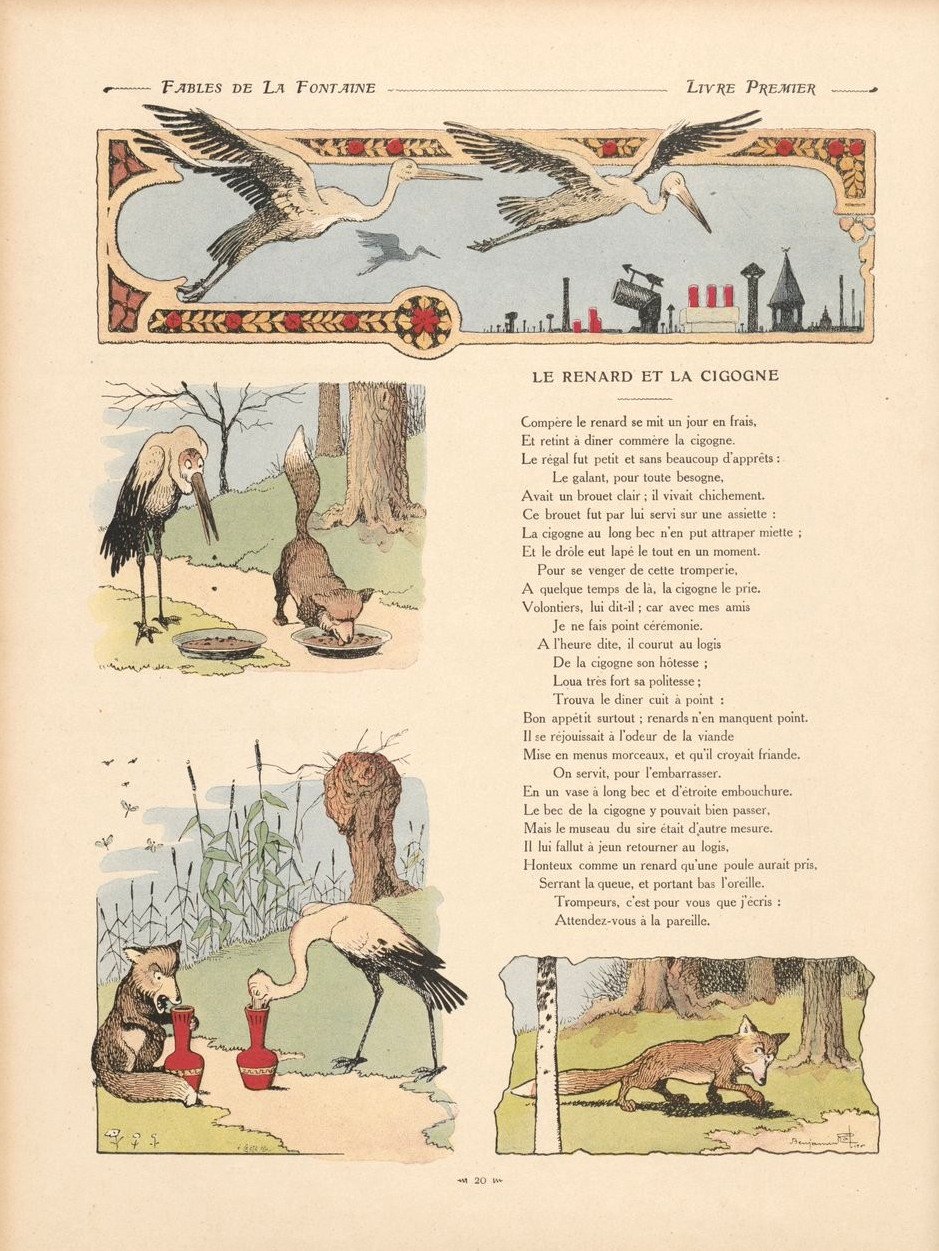 Fables de La Fontaine illustrées par Benjamin Rabier : Le renard et la cigogne.